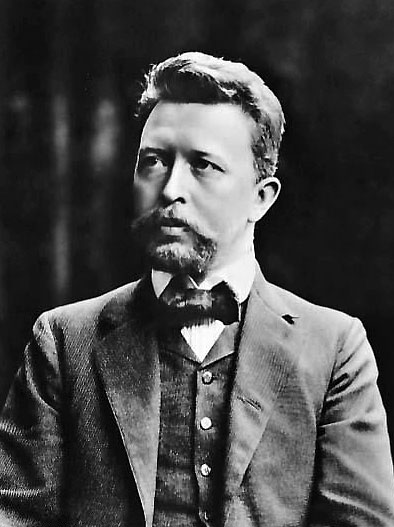 Wilhelm Peterson-Berger, foto